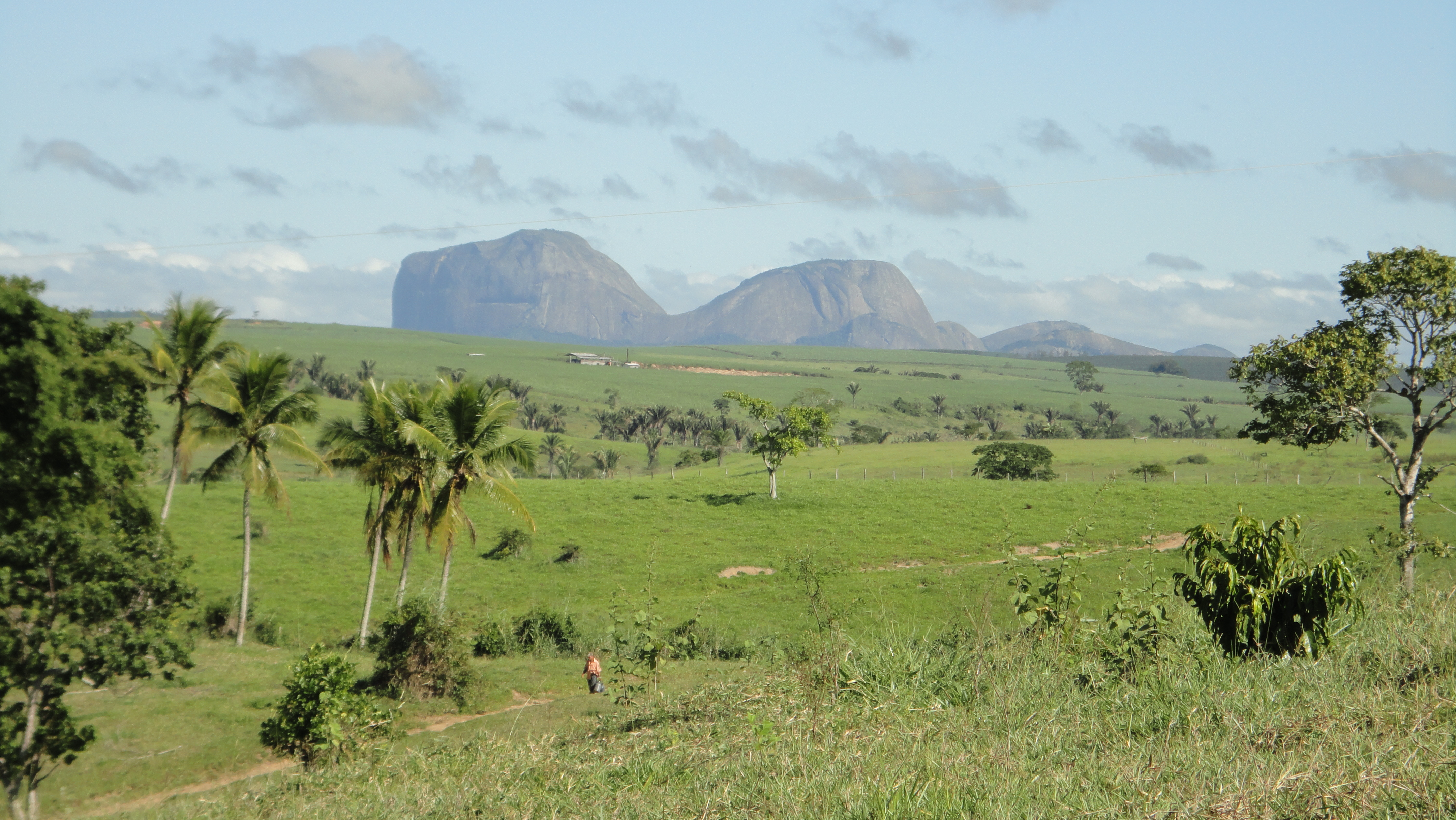 Sitio Boavista - Serra dos Aimorés-MG x Ibirapuã-BA